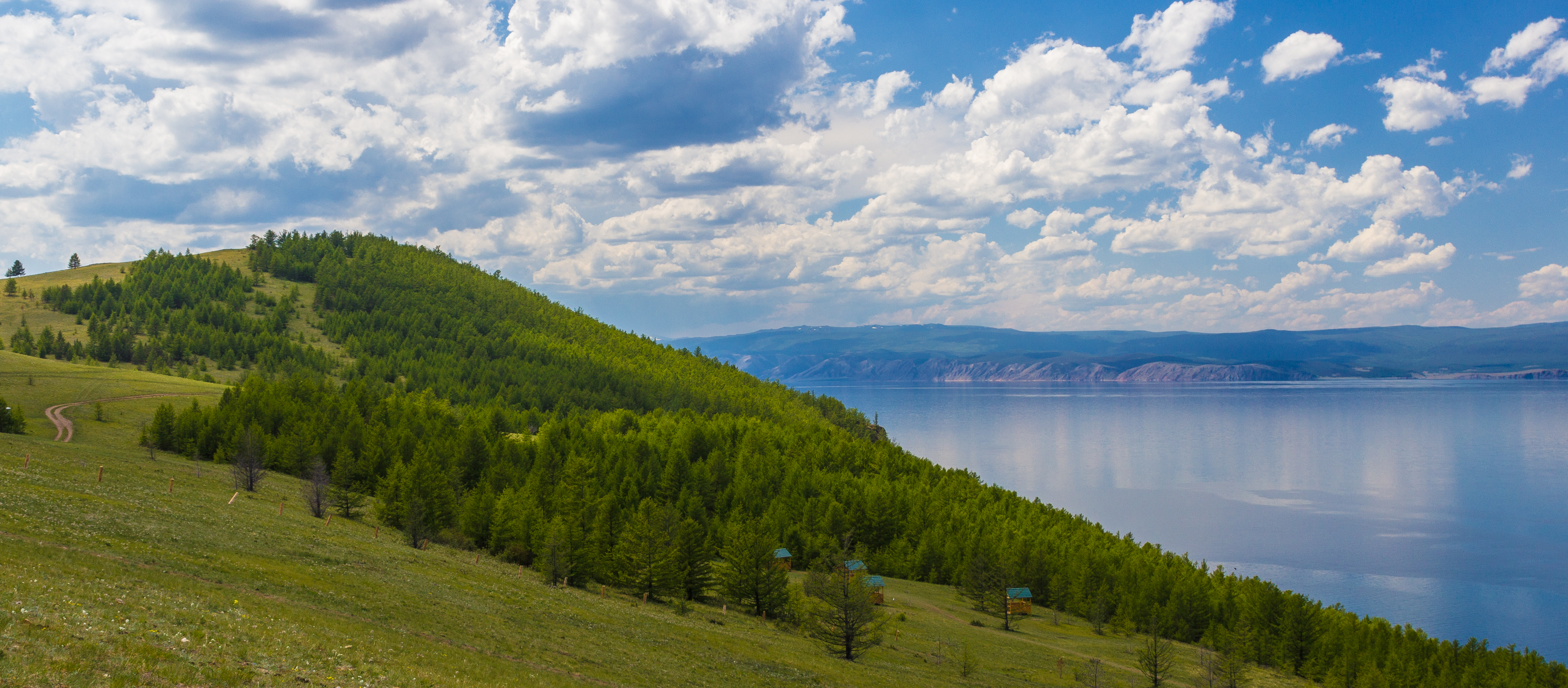 2014-06-13_10-25-47_IMG_6933-47-2-2